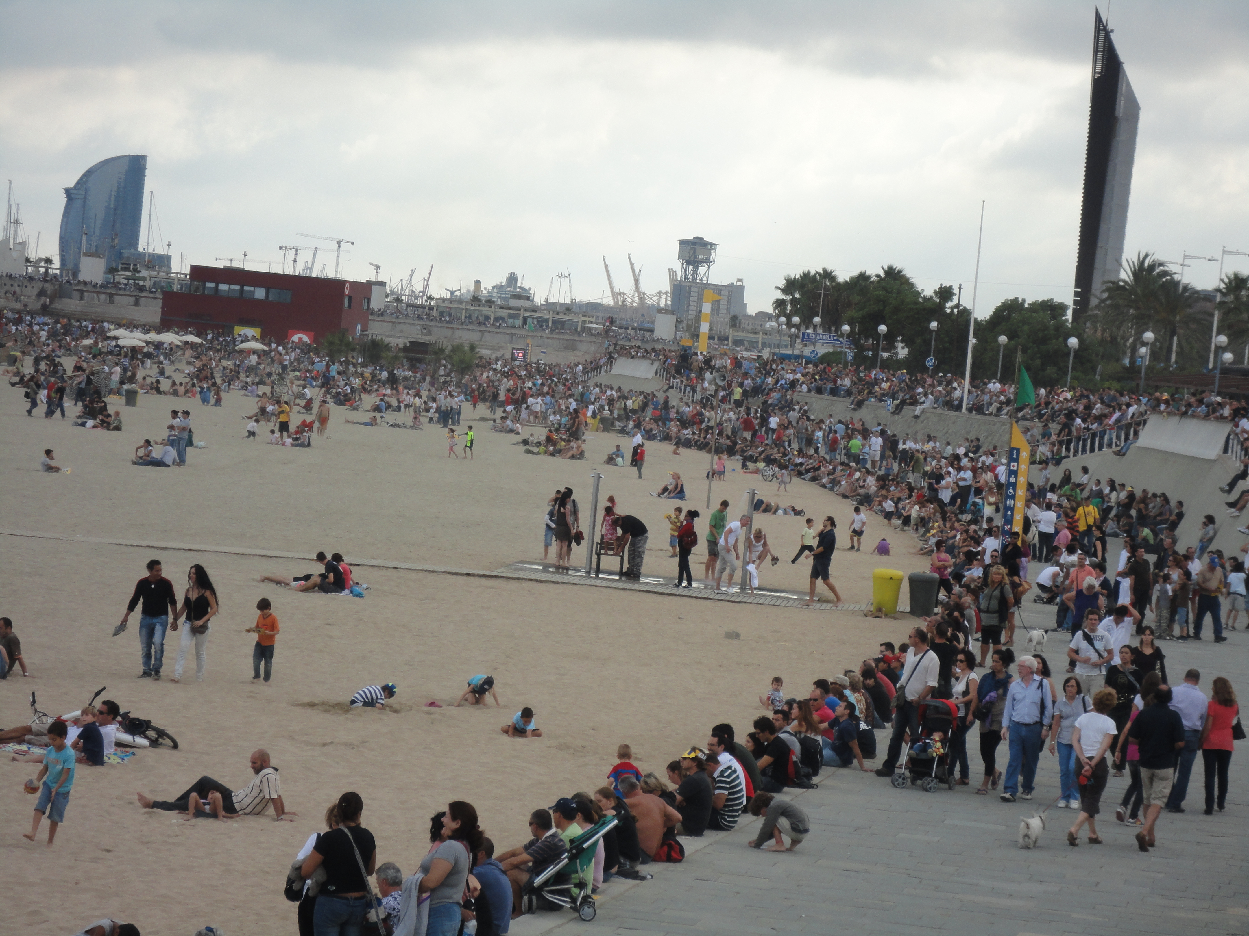 Espectadores de la Festa del Cel (2010) en la Platja del Bogatell de Barcelona